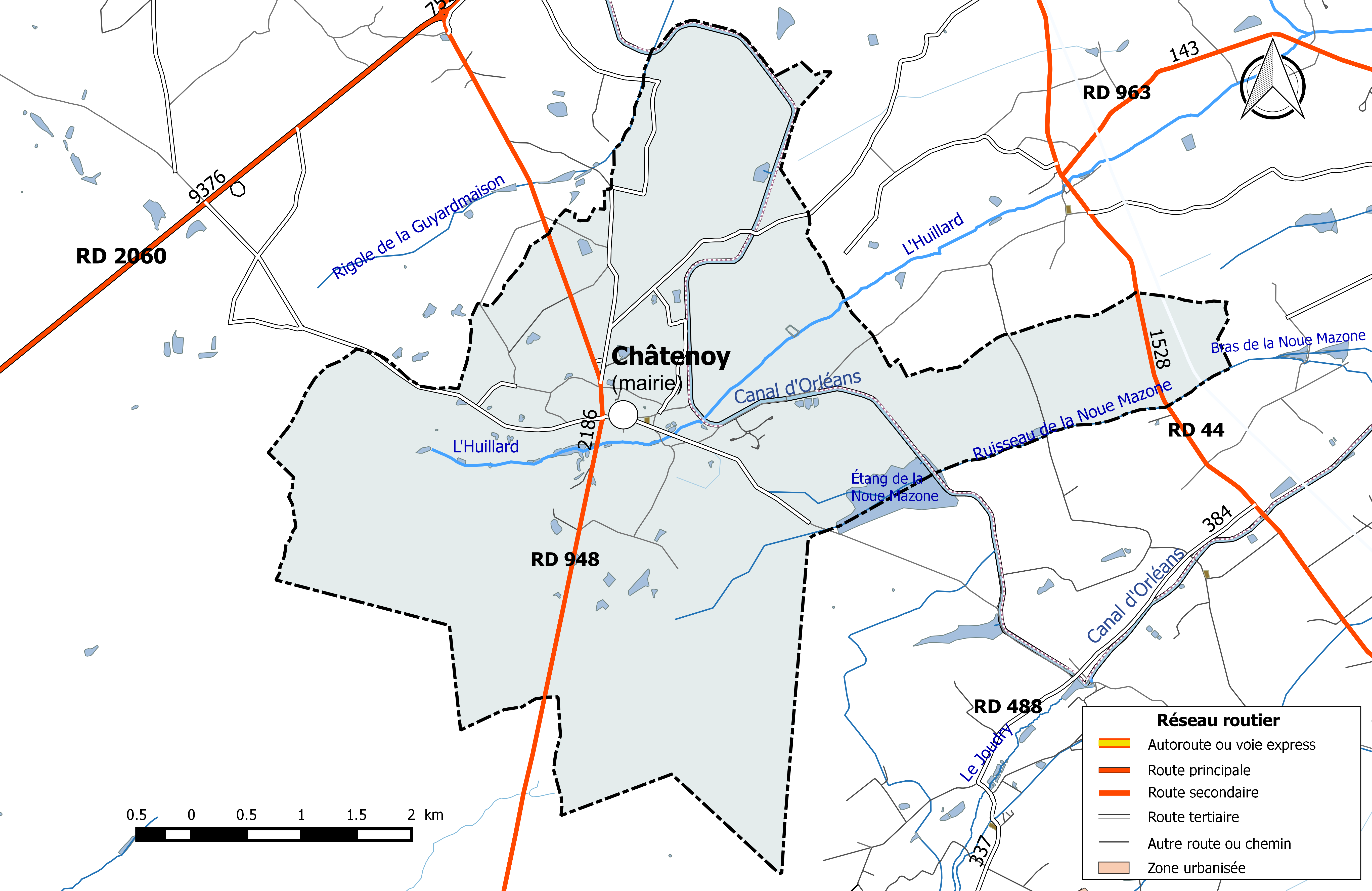 Carte du réseau routier de la commune de Châtenoy (Loiret).